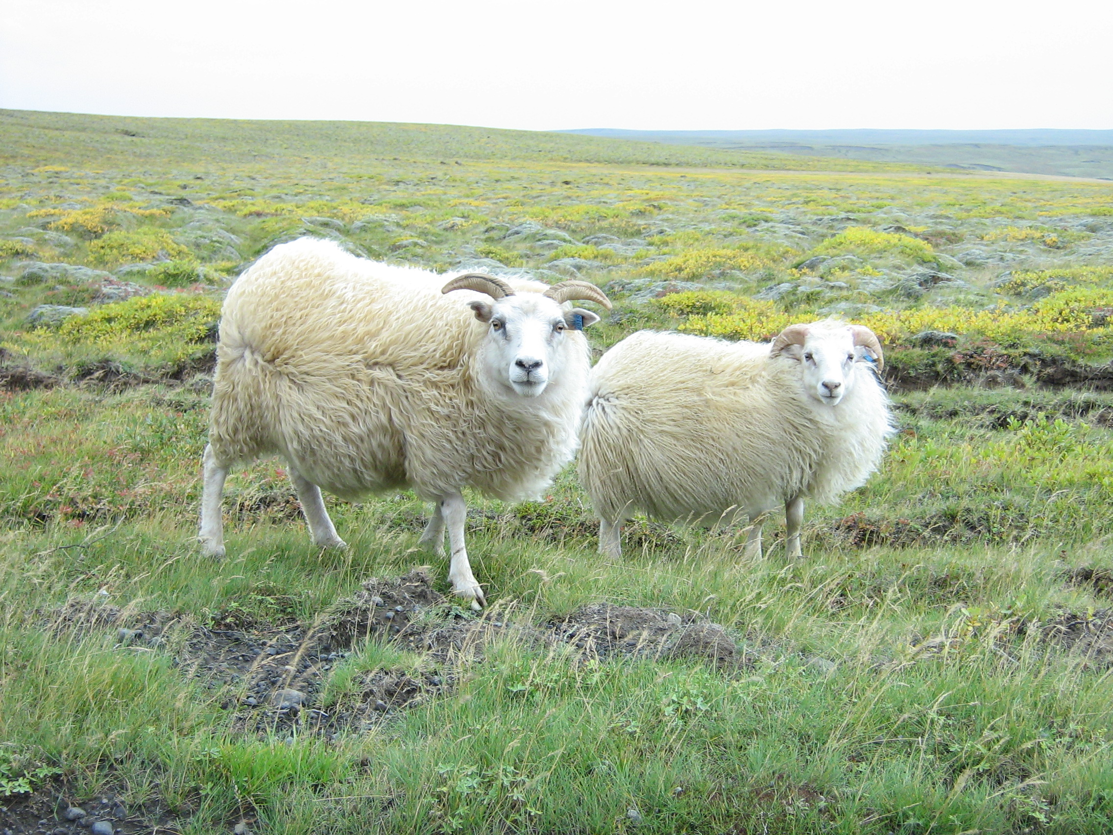 Island Thingvellir Schafe